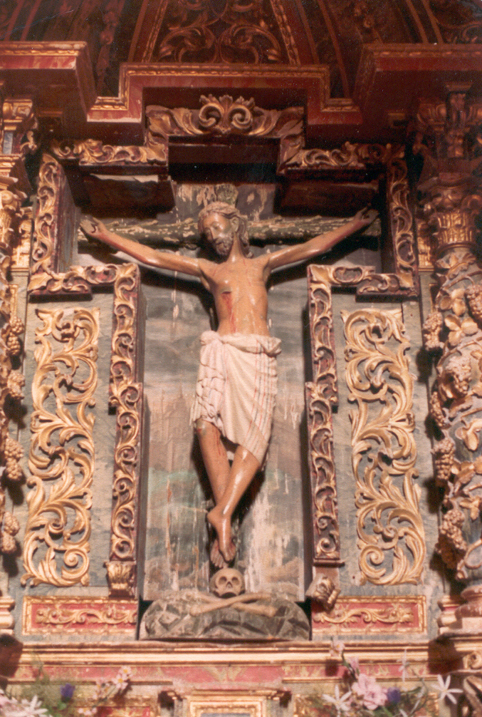 Imagen de Santo Cristo de Reveche (Gumiel de Izán, Burgos, España)